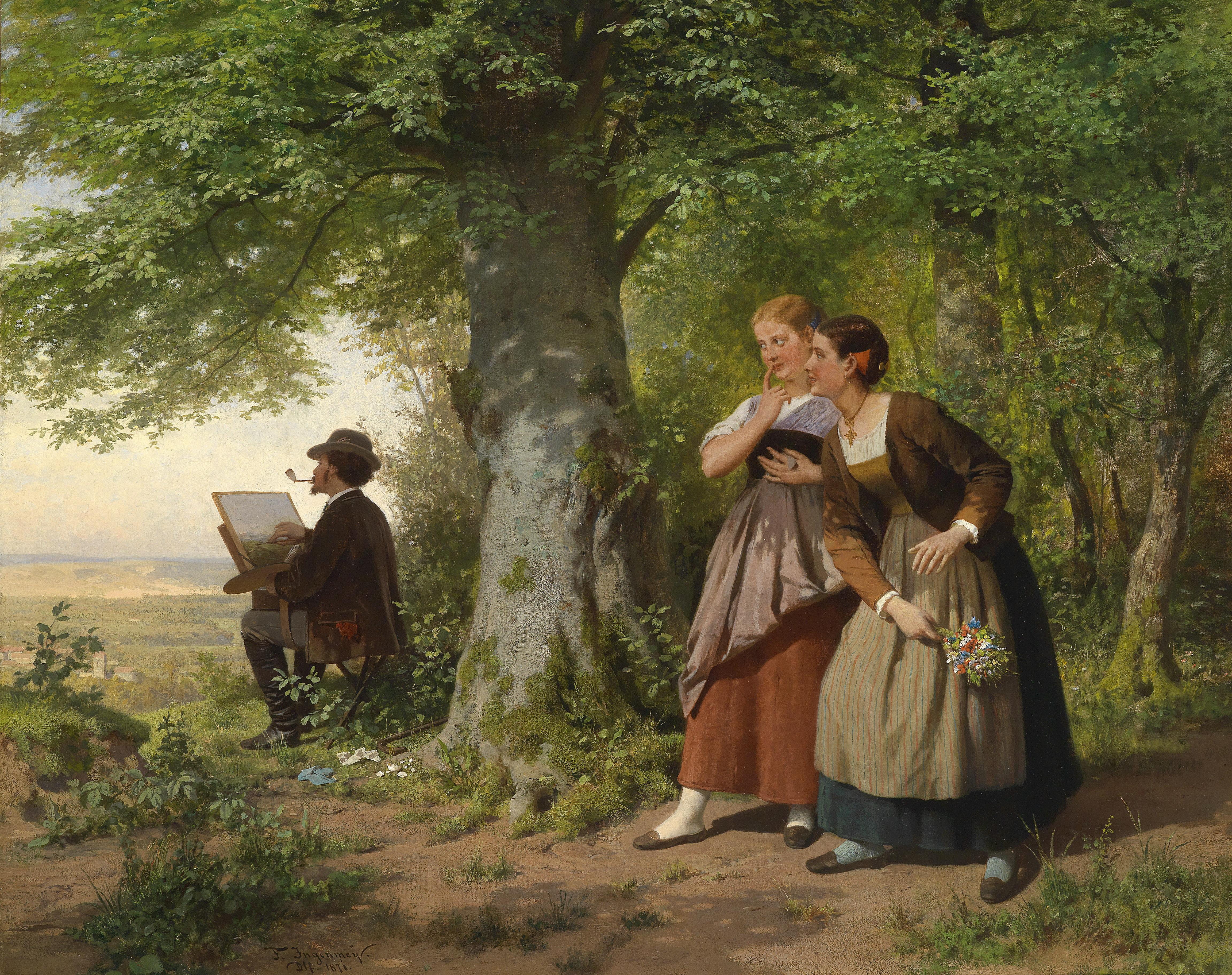 Der bewunderte Künstler, signiert, datiert, bezeichnet F. Ingenmey 1871 Ddf., Öl auf Leinwand, 64 x 79,5 cm